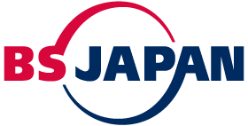 中文（台灣）: BS JAPAN 2011年版商標。